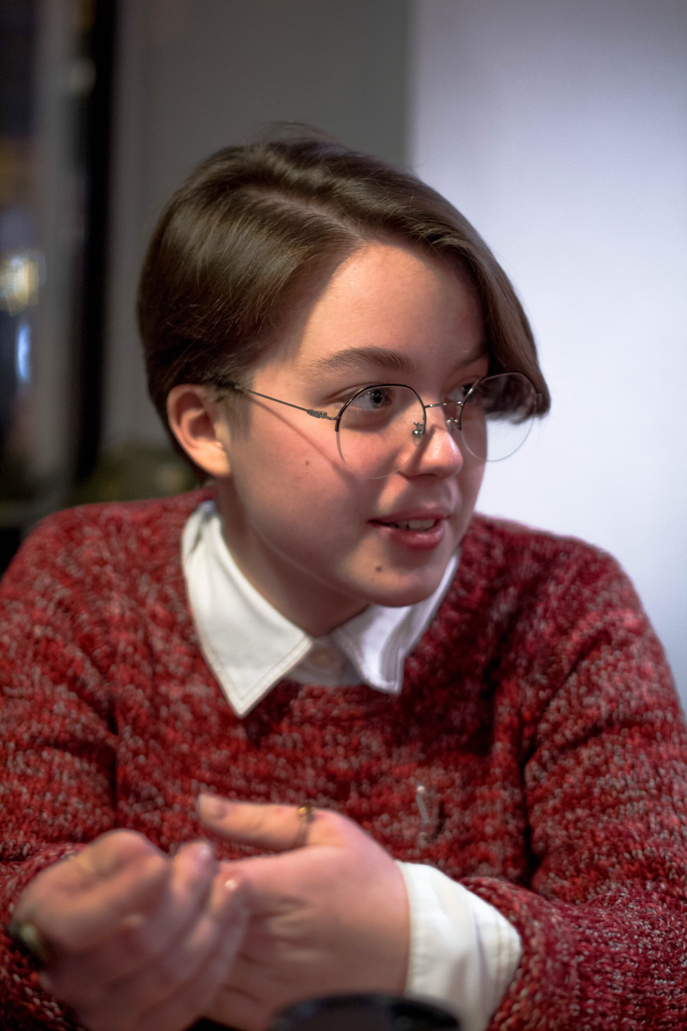 Беларуская (тарашкевіца): Беларуская паэтка Янка Каліноўскі